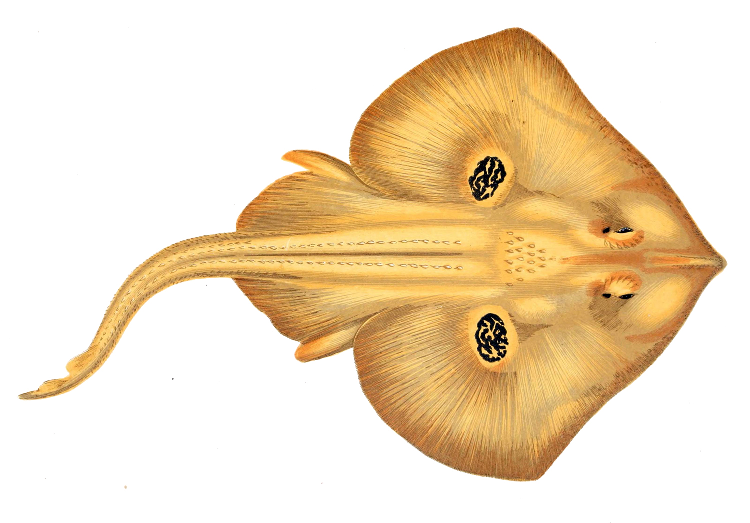 Leucoraja naevus. Describe in "Les Poissons" p425 as young Raja circularis